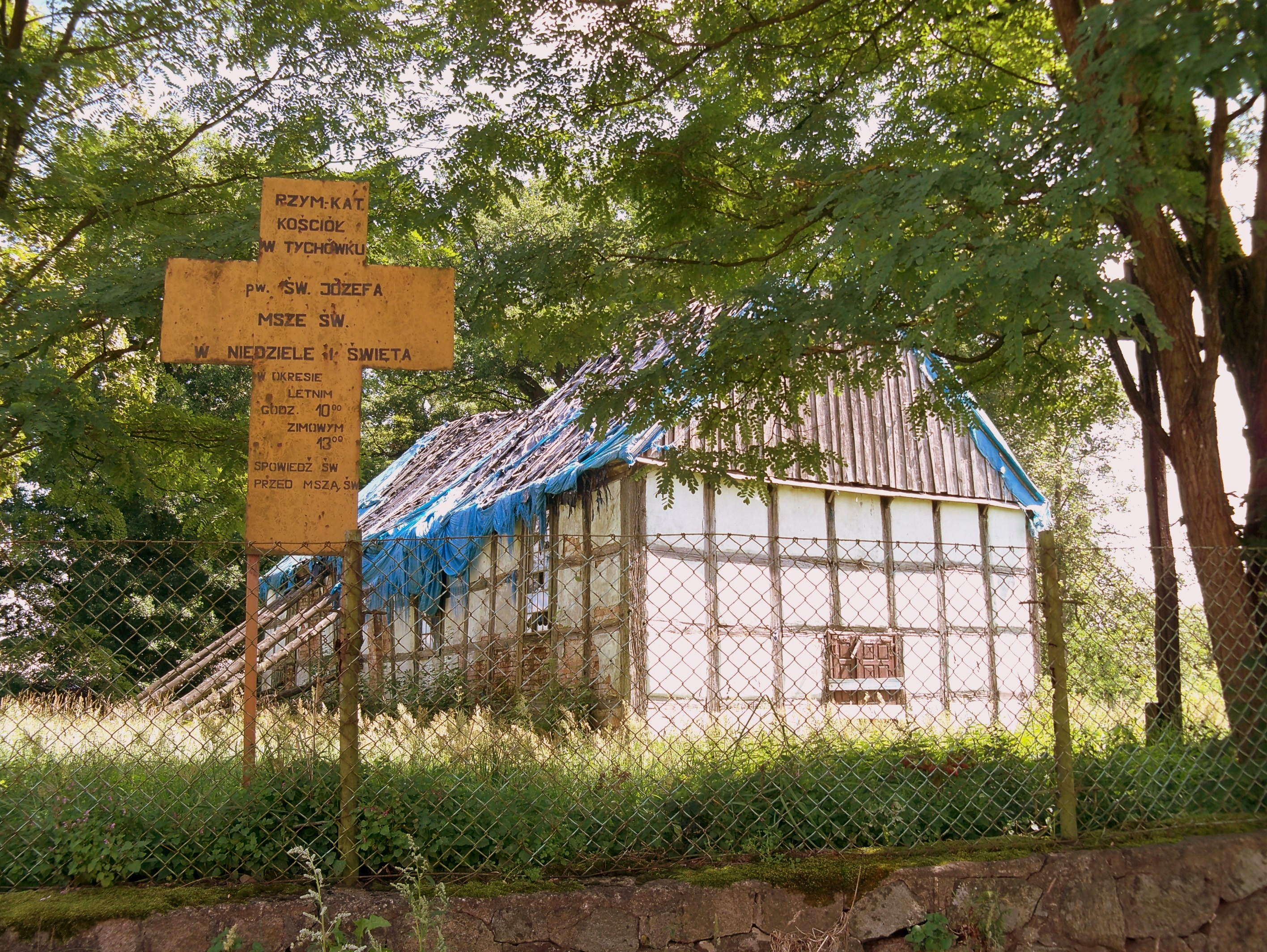 Tychówko - dawny kościół ewangelicki, obecnie rzymskokatolicki filialny p.w. św. Józefa, Oblubieńca NMP, ryglowy z 1739 r. 10.1956.